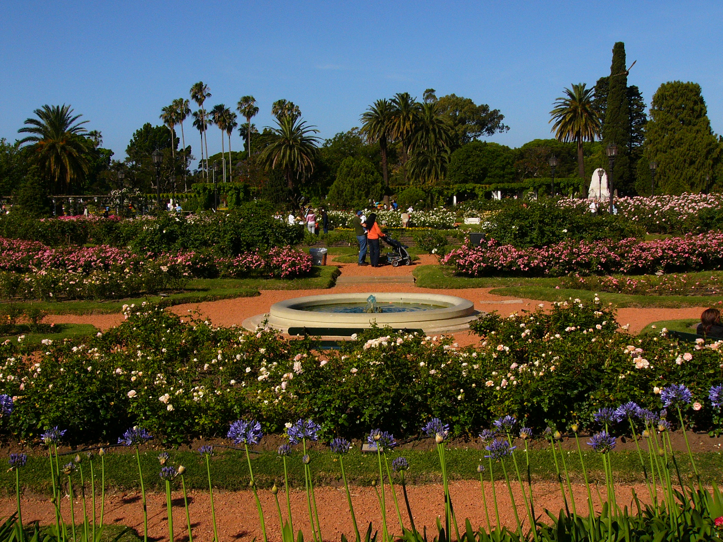 Rosedal park in Buenos Aires, Argentina